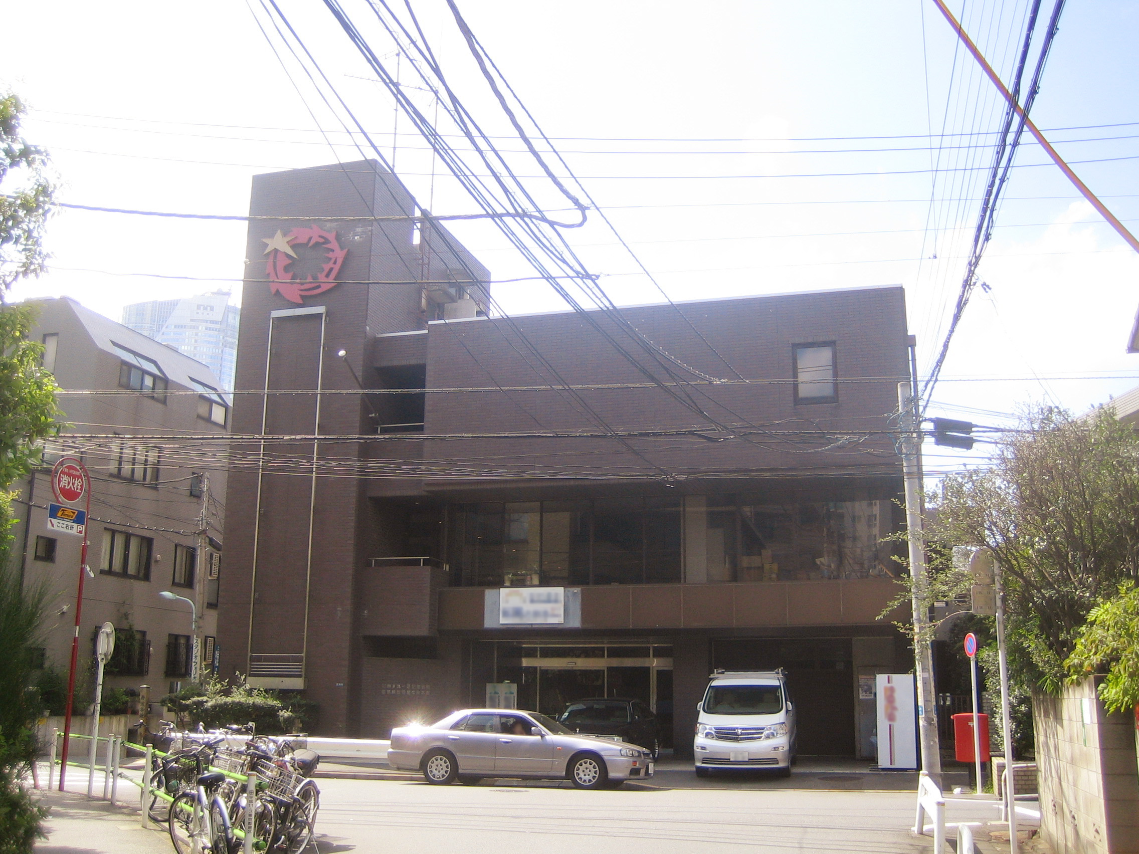 部落解放同盟中央本部。東京都港区六本木 Buraku Liberation League (部落解放同盟 Buraku Kaihō Dōmei) , at Roppongi, Minato, Tokyo, Japan